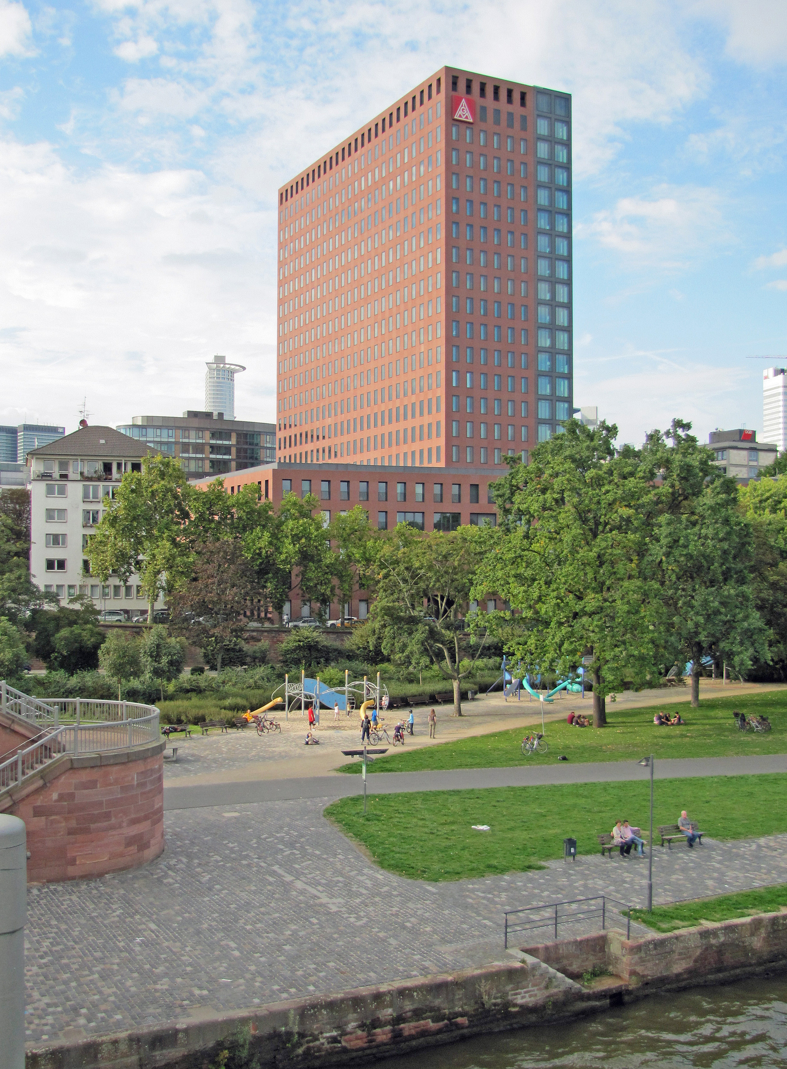 IG-Metall Verwltung in Ffm.